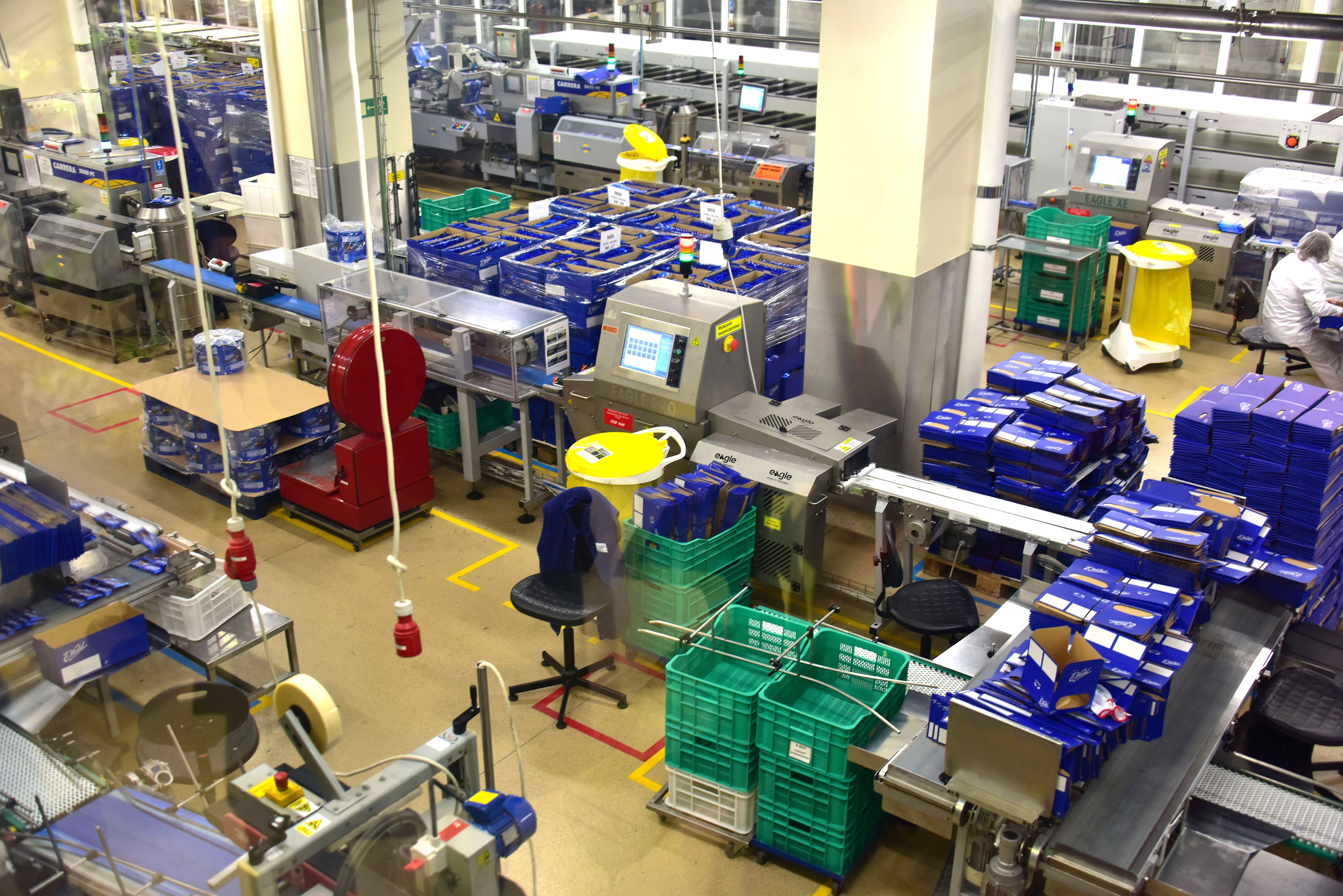 Fabryka Lotte Wedel w Warszawie. Fragment linii Venus do produkcji czekolady